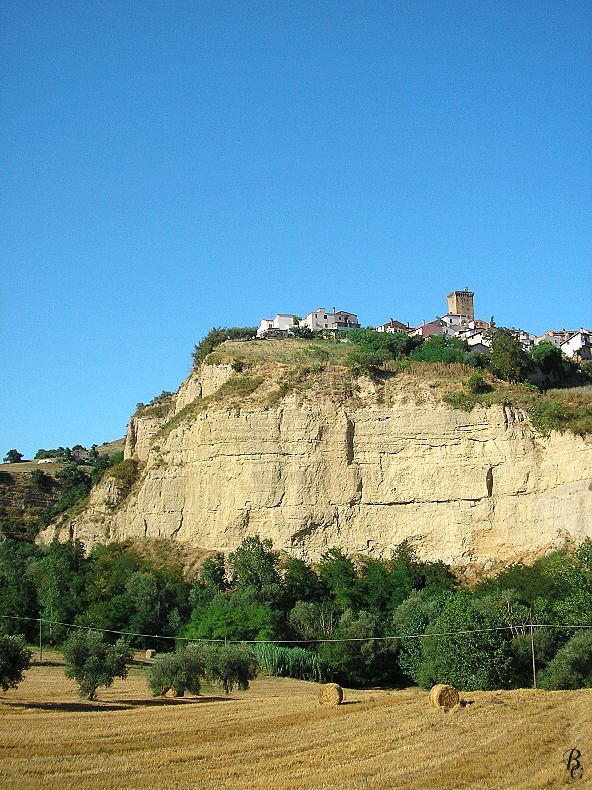 Rupe di Ripattoni frazione di Bellante (Teramo)